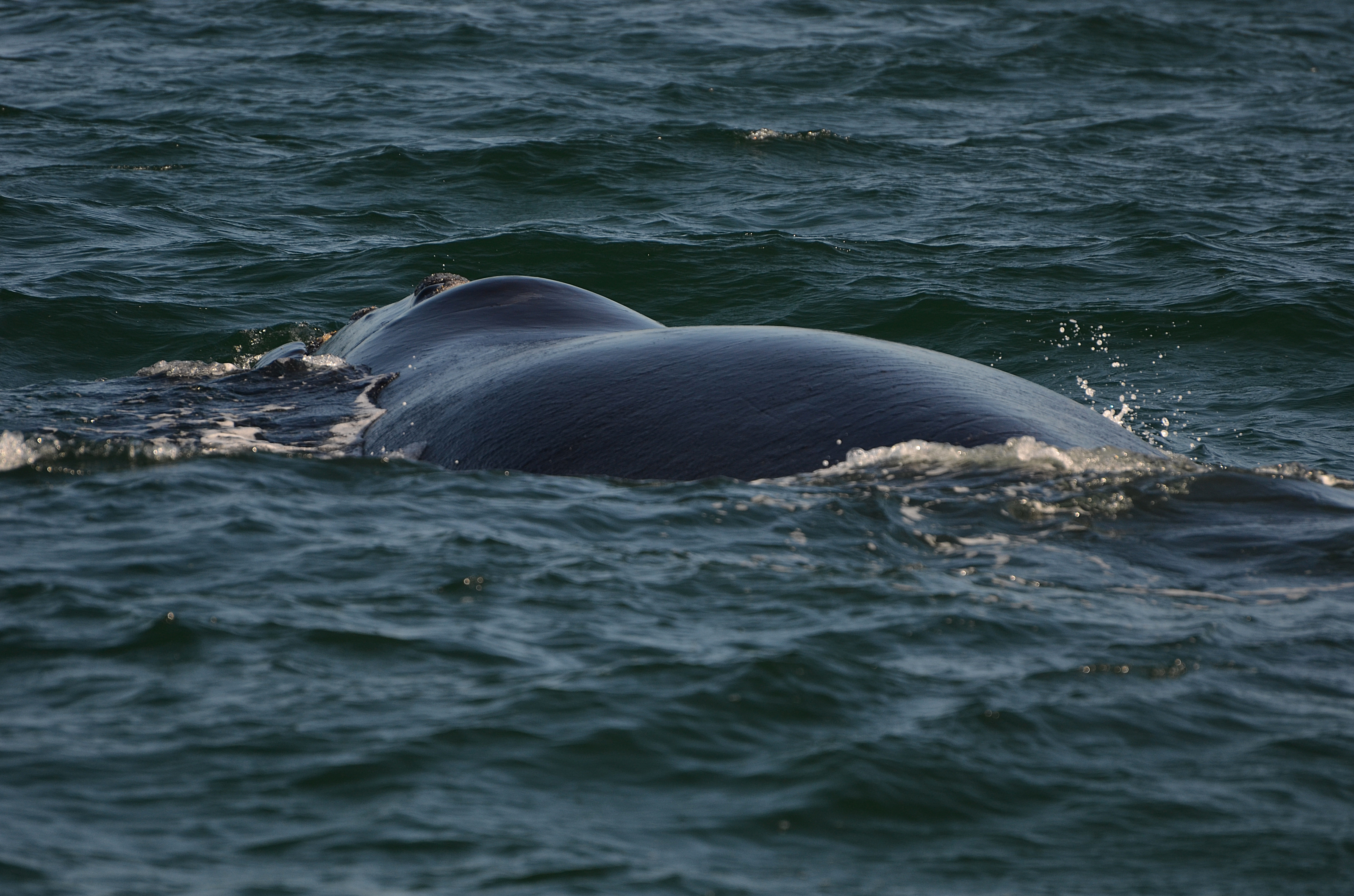 Velryba u města Hermanus